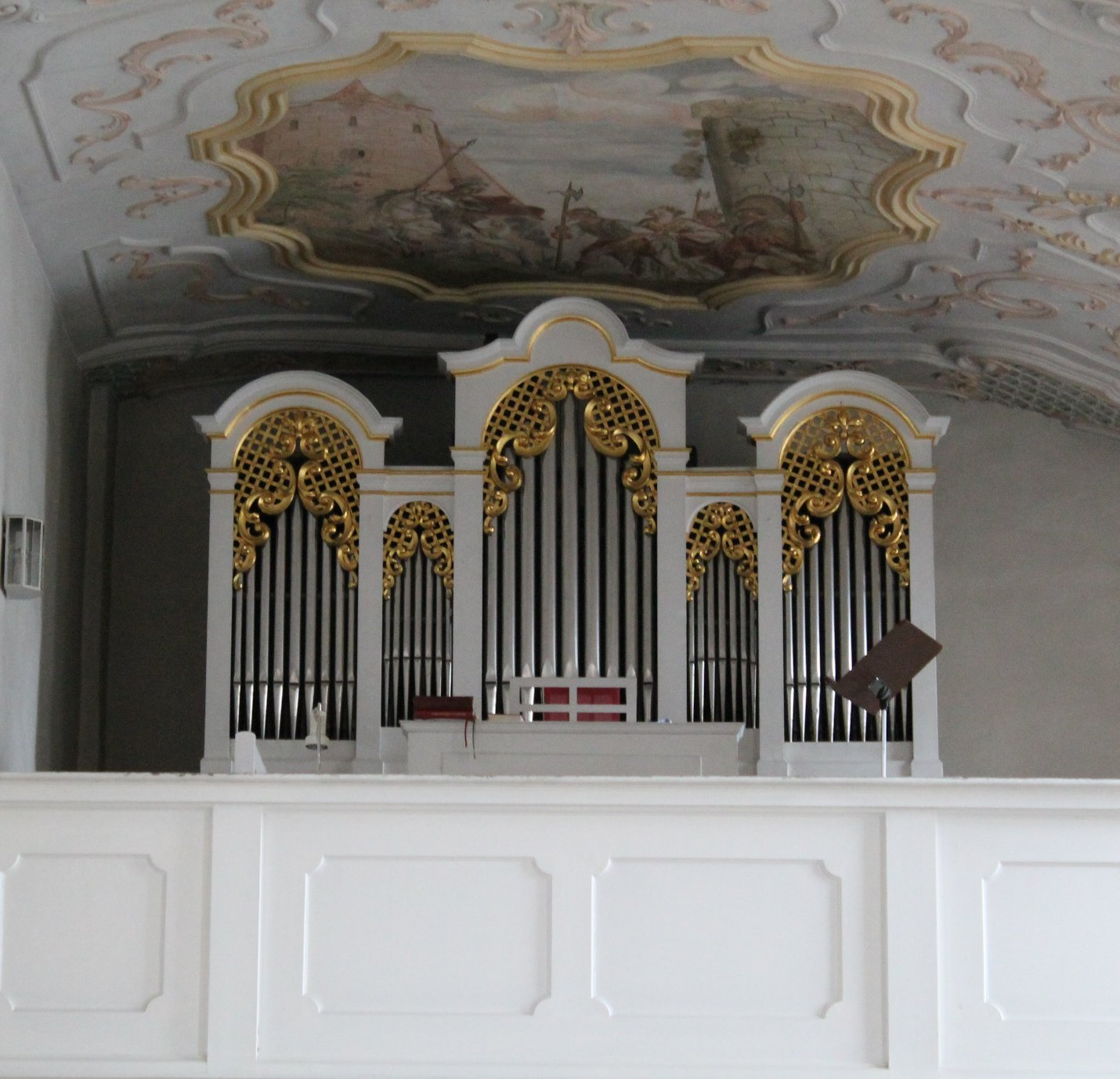 Orgel von St. Katharina in Garching bei München Franz Borgias Maerz, 1893 I/10